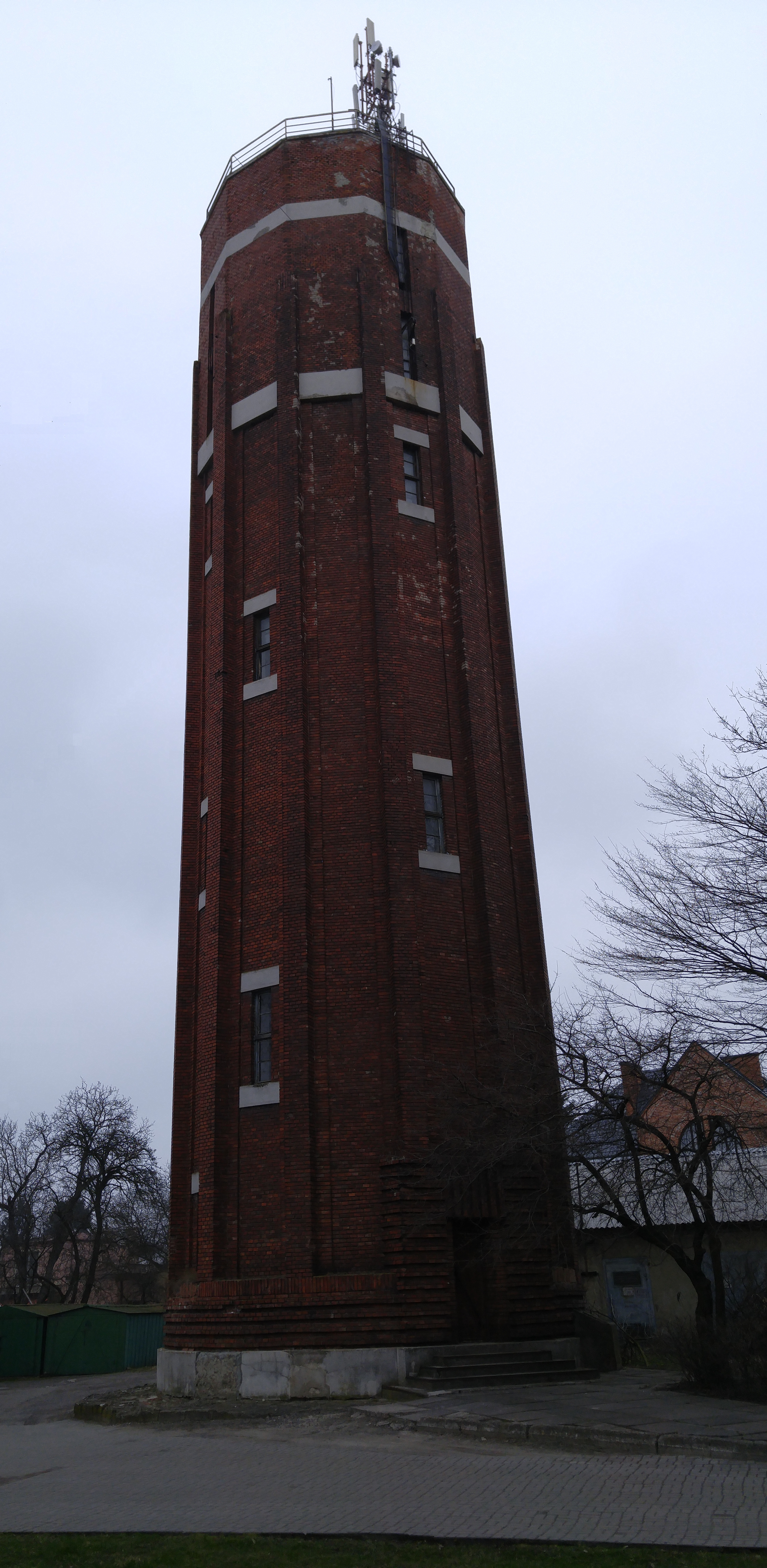 Водонапірна вежа на Новому Львові поблизу парку Залізна вода у Львові, збудована 1933 року за проектом Вітольда Мінкевича (1880—1961). Зверху встановлені антени станцій мобільних телефонів та блискавкозахист. Україна, Львів, вул.Тернопільська, 24А.